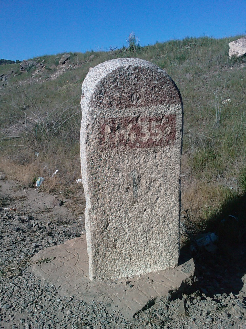 Hito de granito antiguo de la N-435, actualmente descatalogada, cerca de Los Santos de Maimona, Badajoz.